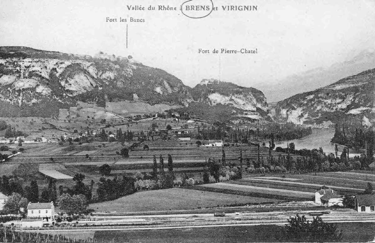 Vallée du Rhône à Brens et Virignin : mise en évidence de Fort-les-Bancs et de Fort de Pierre-Châtel